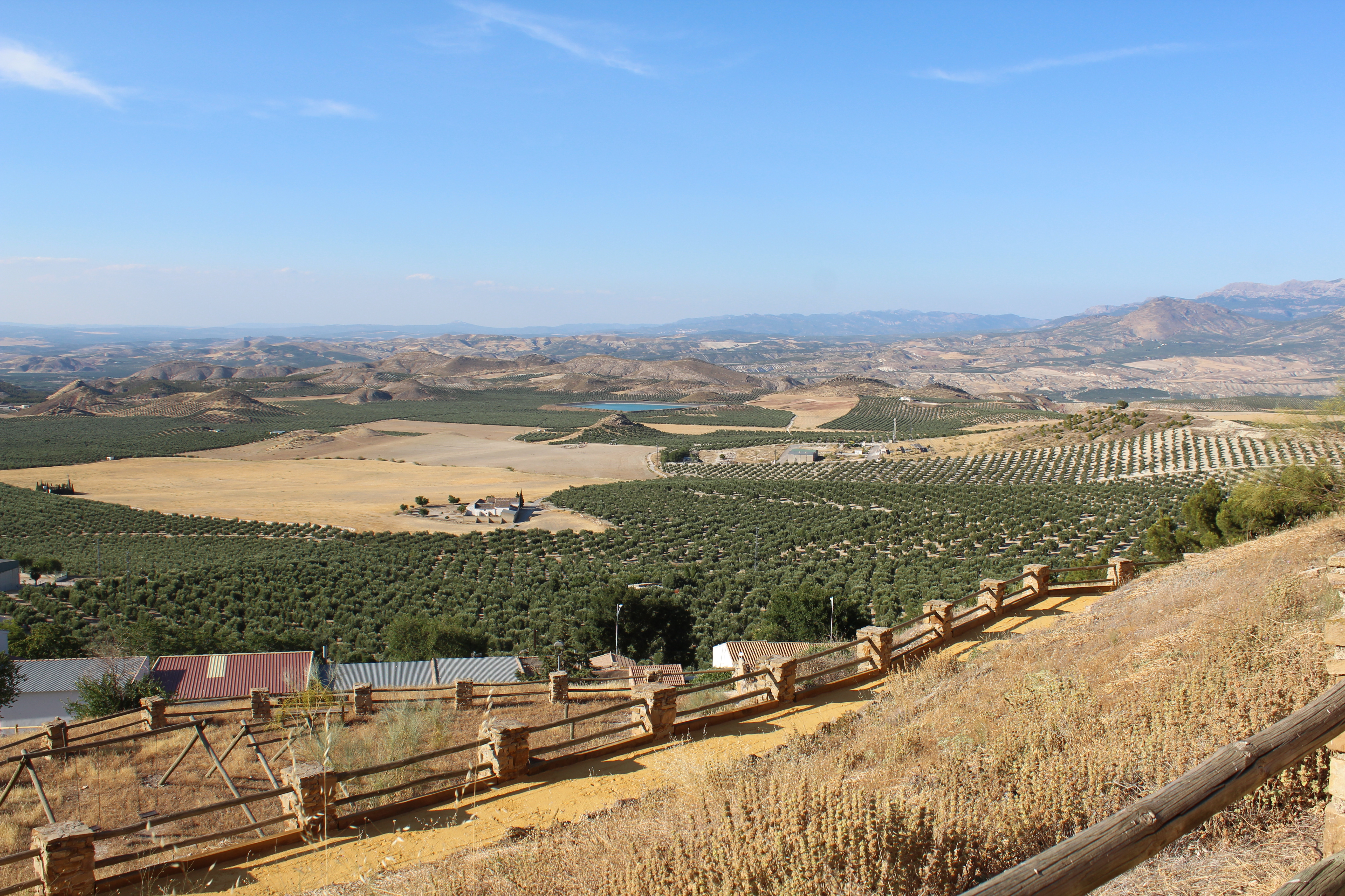 Vista de los campos de Larva.